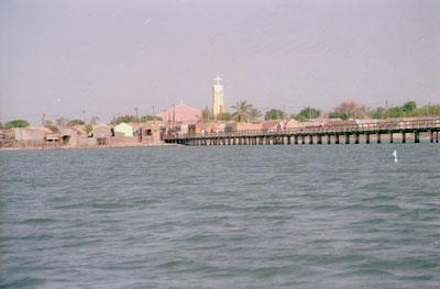 Brücke Joal-Fadiouth.